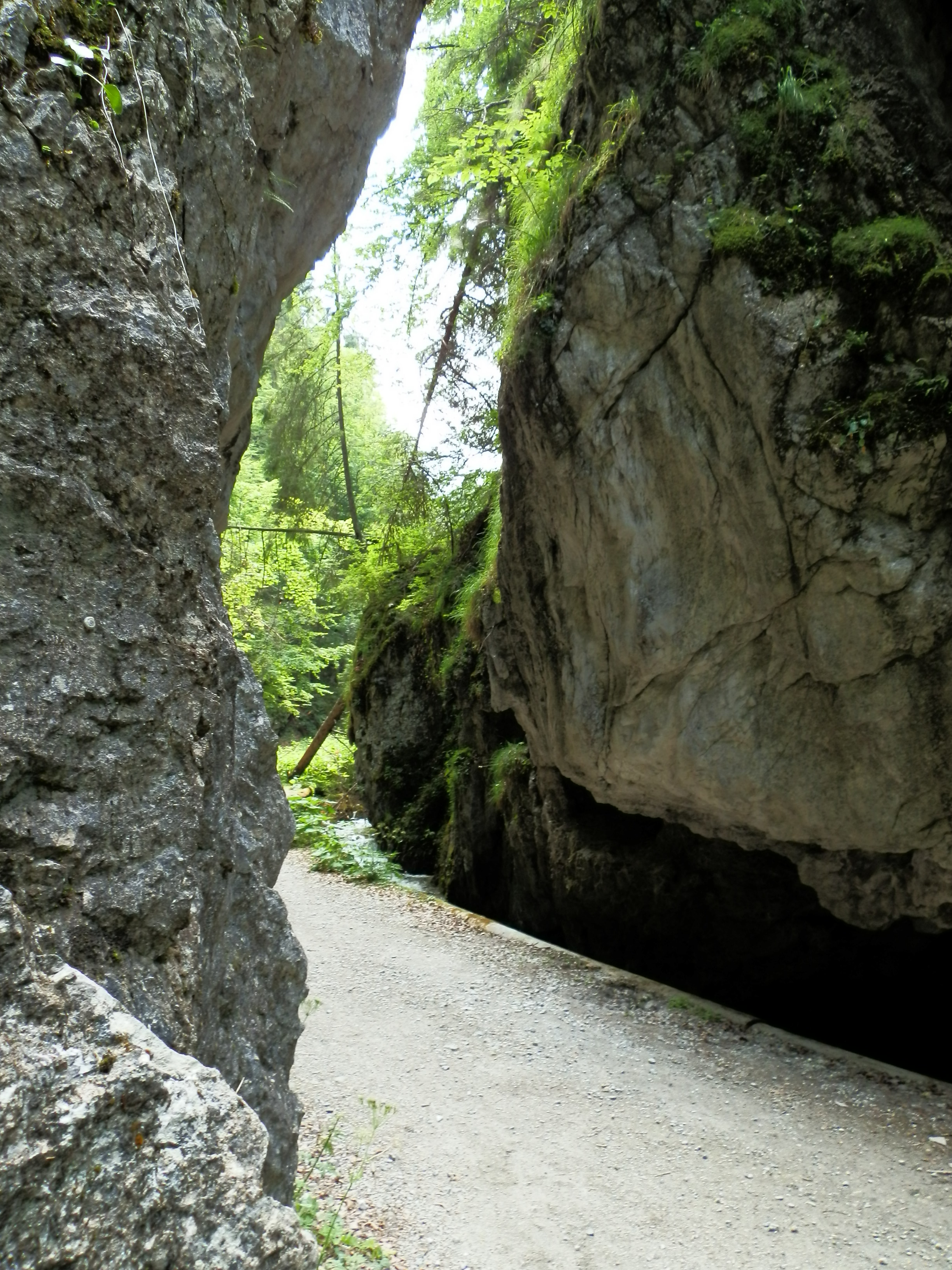 Čertová brána